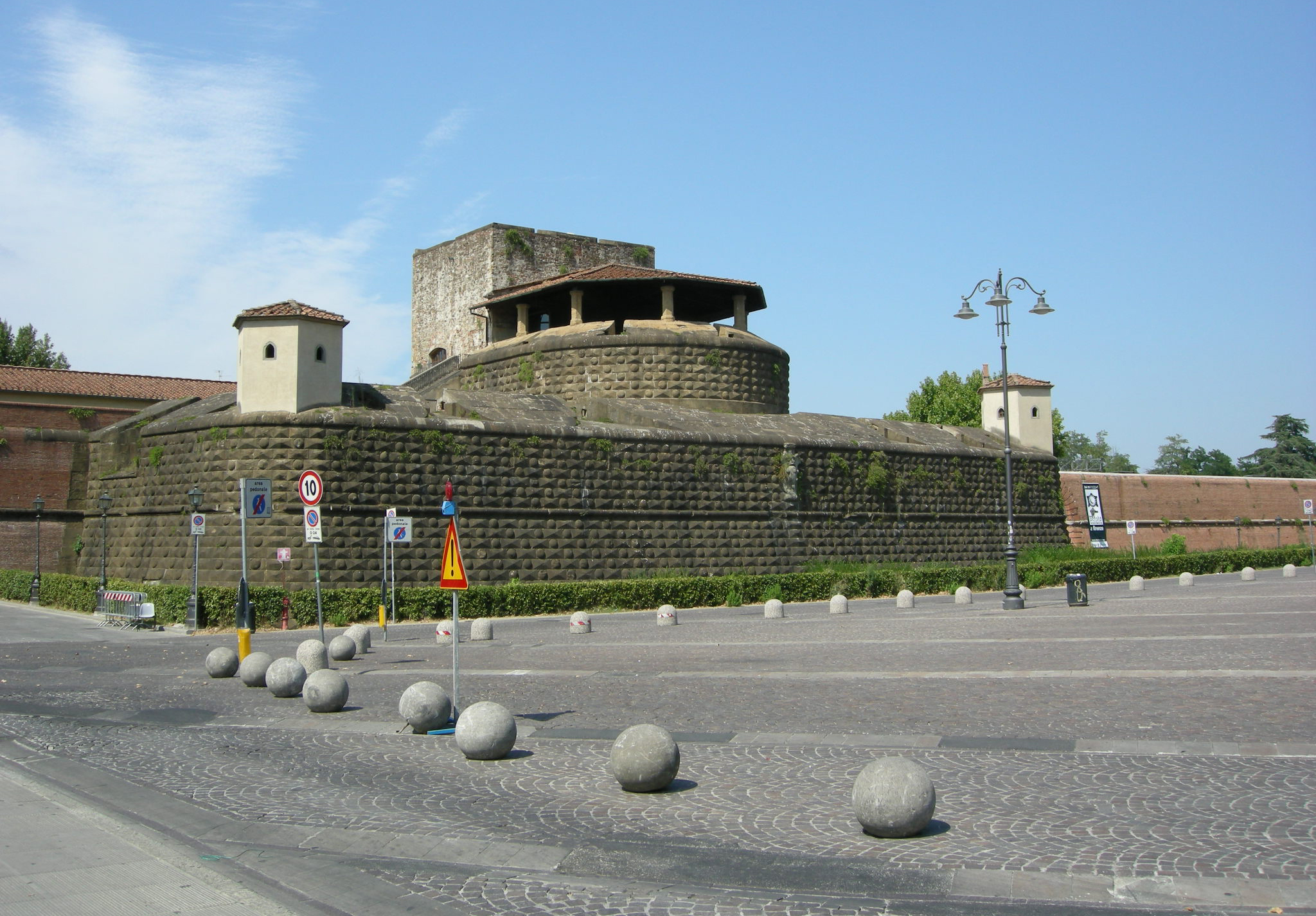 Fortezza da basso, piazza bambine e bambini di beslan 2